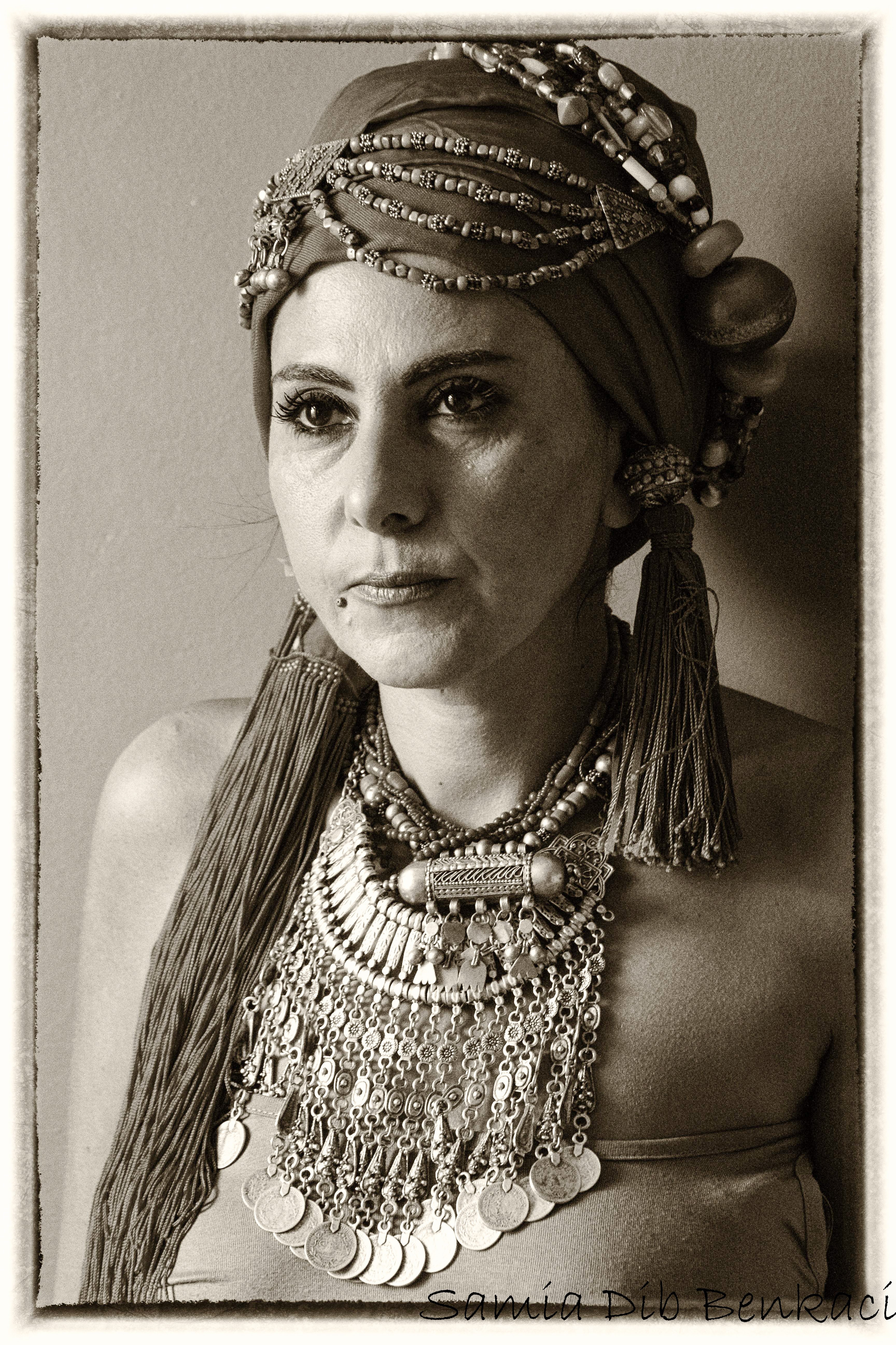 femme aux bijoux This is an image of Cultural Fashion or Adornment from Algeria